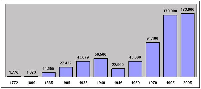 Einwohnerentwicklung Olsztyn (Allenstein)